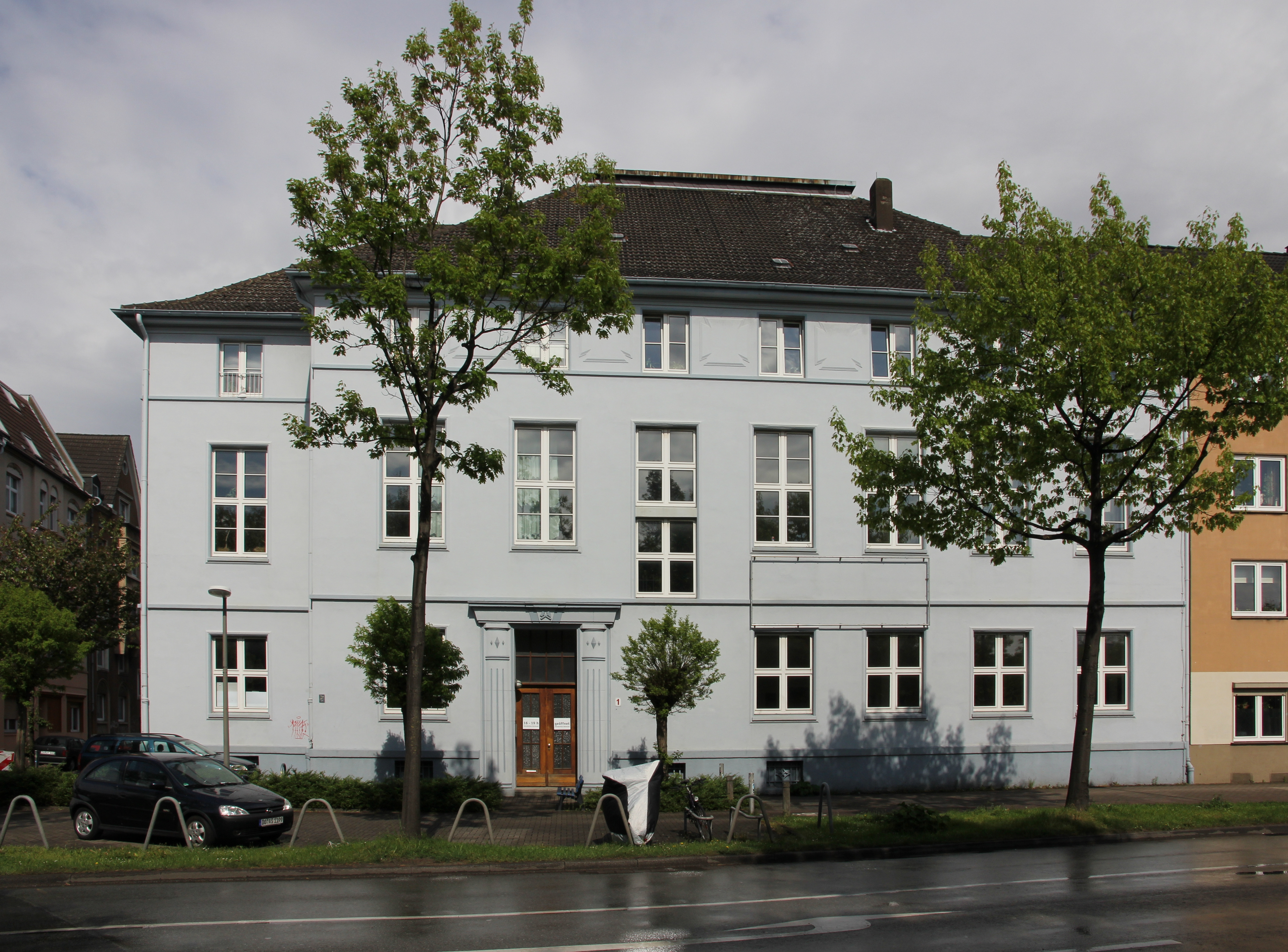 Ehemalige Waschkaue der Zeche Westphalia, heute Künstlerhaus Dortmund.